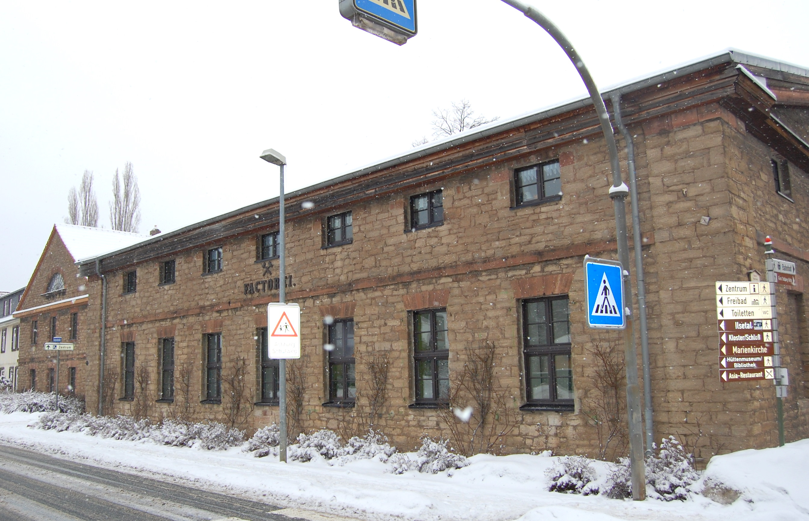 Factorei in Ilsenburg